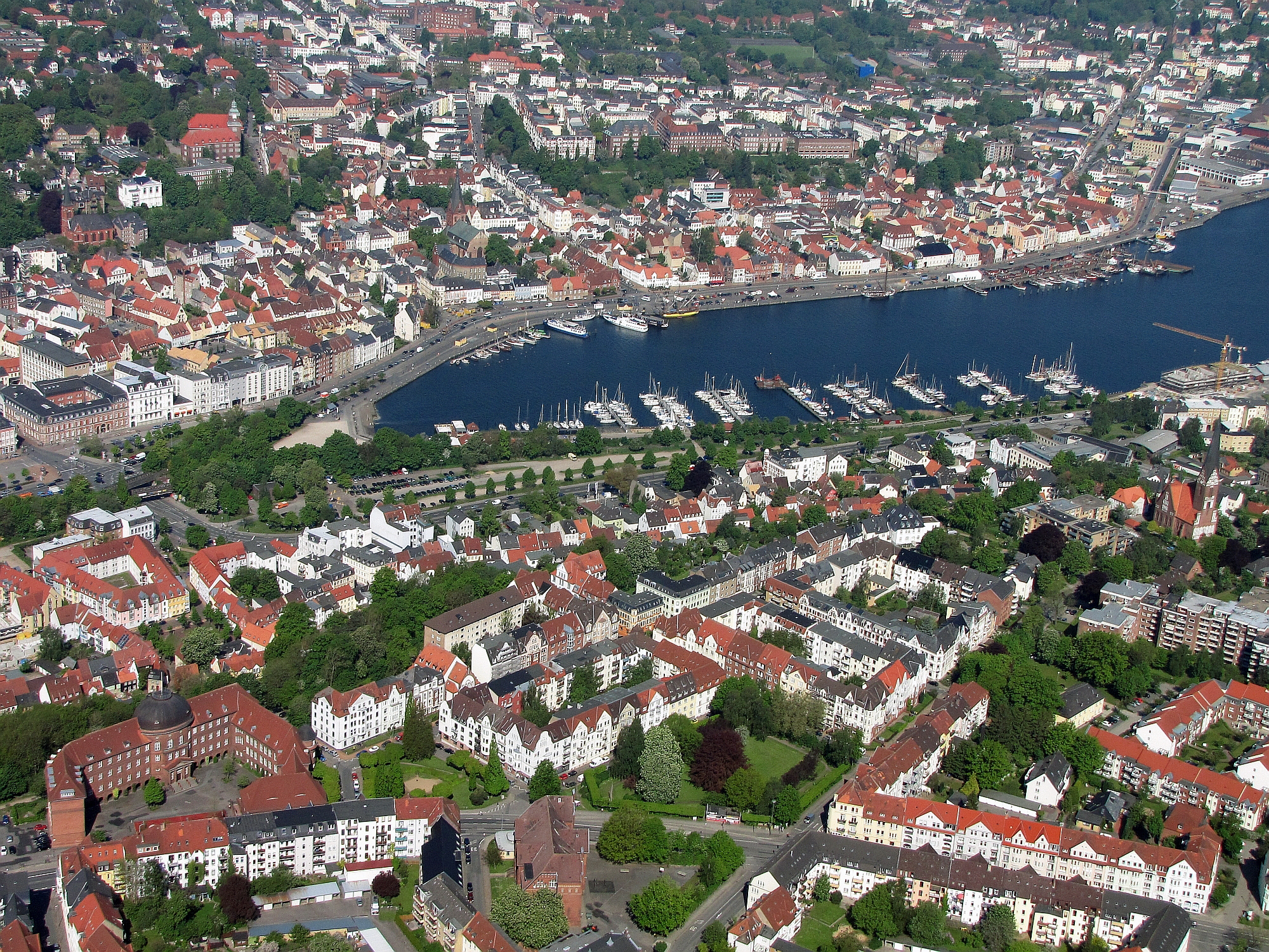 Luftbild Stadt Flensburg in Schleswig-Holstein, Deutschland von Süden mit Blick auf Zentrum, Altstadt und Stadthafen (Foto 2012 Wolfgang Pehlemann Steinberg-Ostsee)